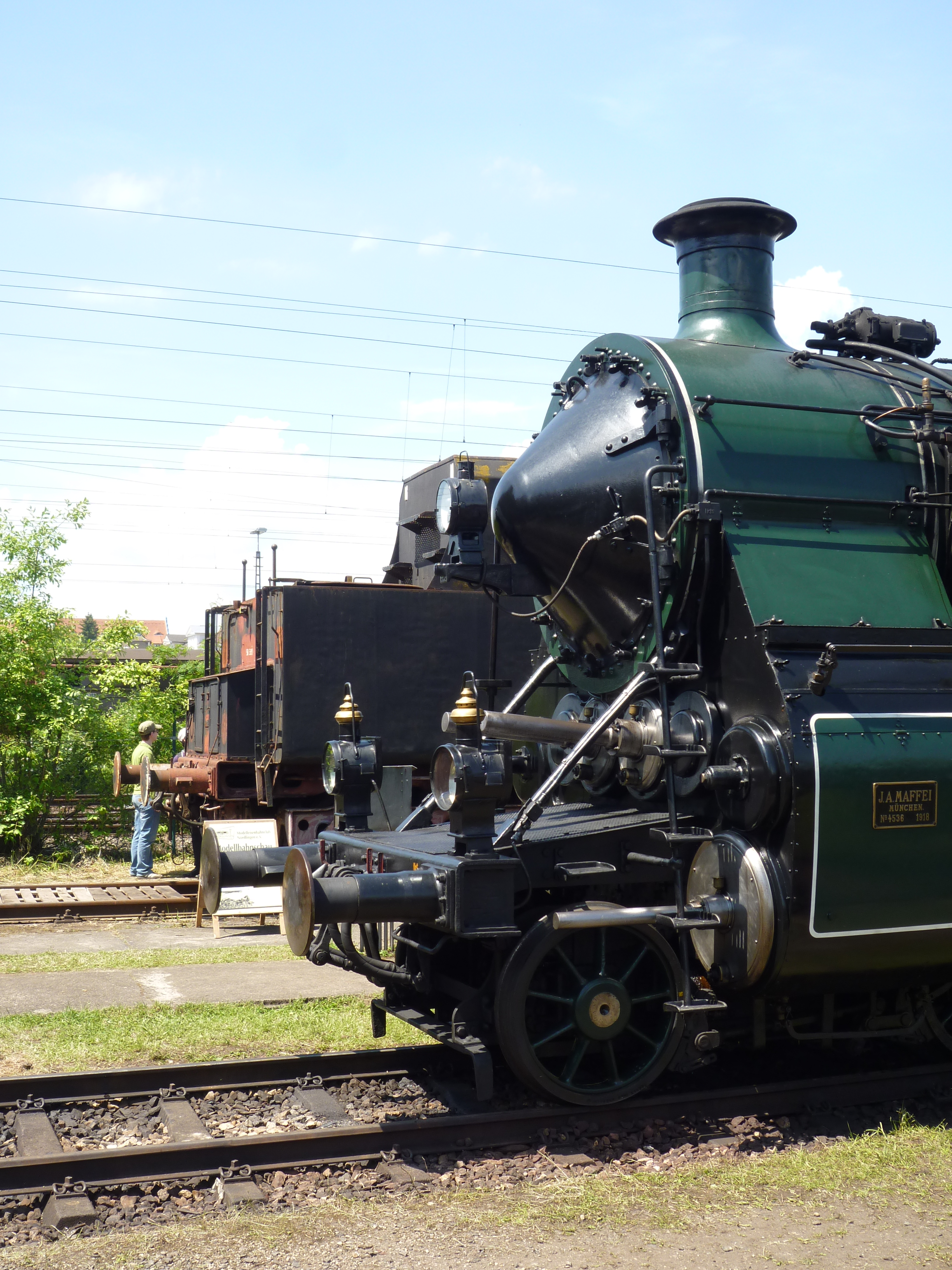 Lokomotive 18 478, Teilbild